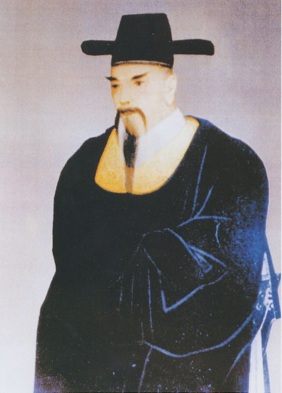 초당 허엽 영정, 조선 중기의 문신이자 청백리, 시인작가 허난설헌과 작가 허균의 아버지